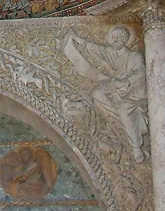 Spandrel in the Basilica di San Marco, Venice